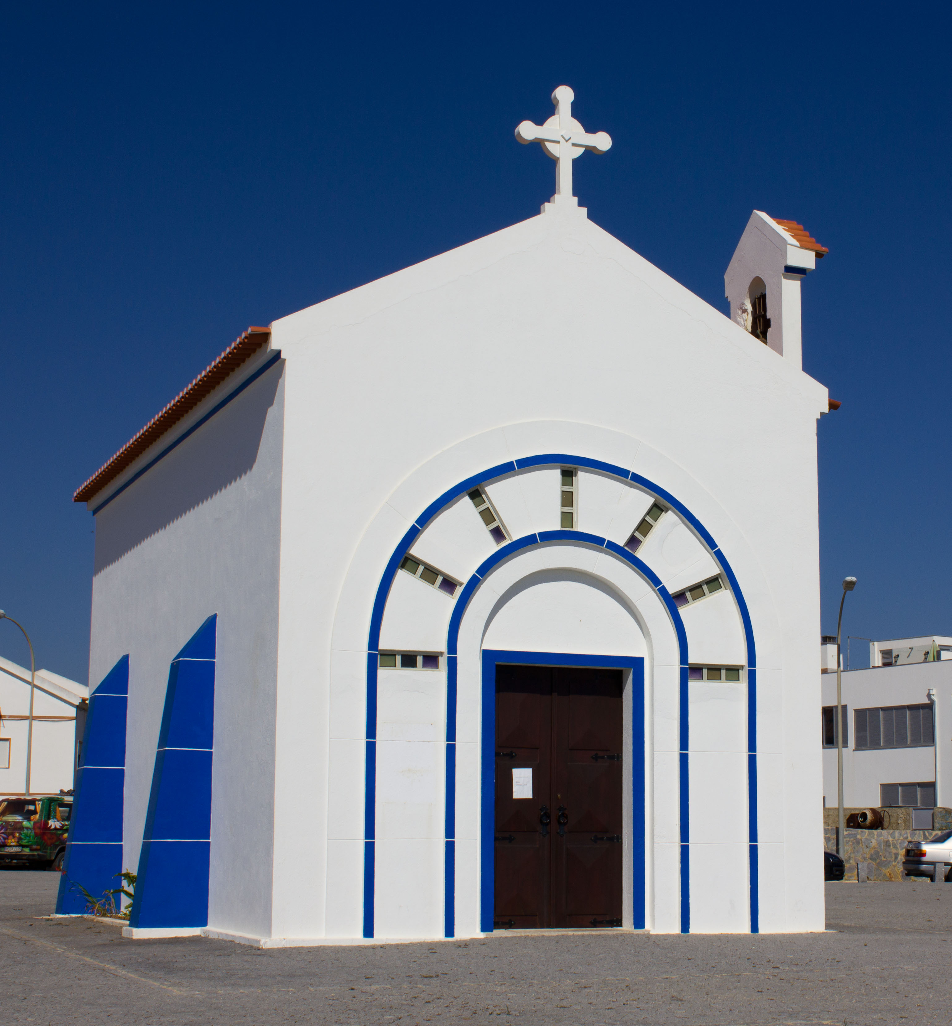 Capela de Nossa Senhora do Mar This file was uploaded for Wiki Loves Monuments in Portugal with the unique identifier 97009560.